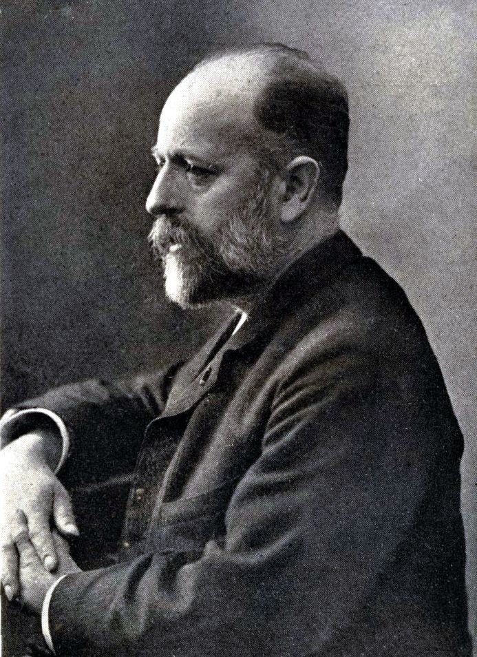 Adolf le Comte (1850-1921), kunstenaar, oud-docent aan de Polytechnische school in Delft, oud-directeur museum Lambert van Meerten, overleden